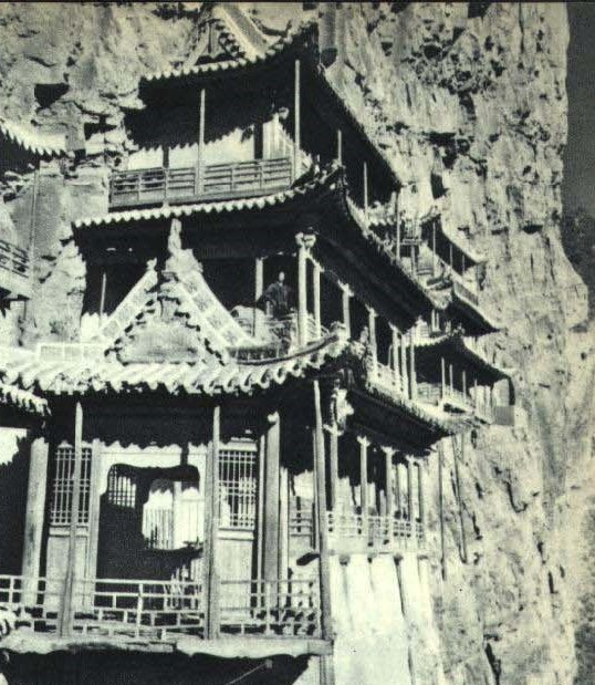 1963-06 1963年 山西悬空寺